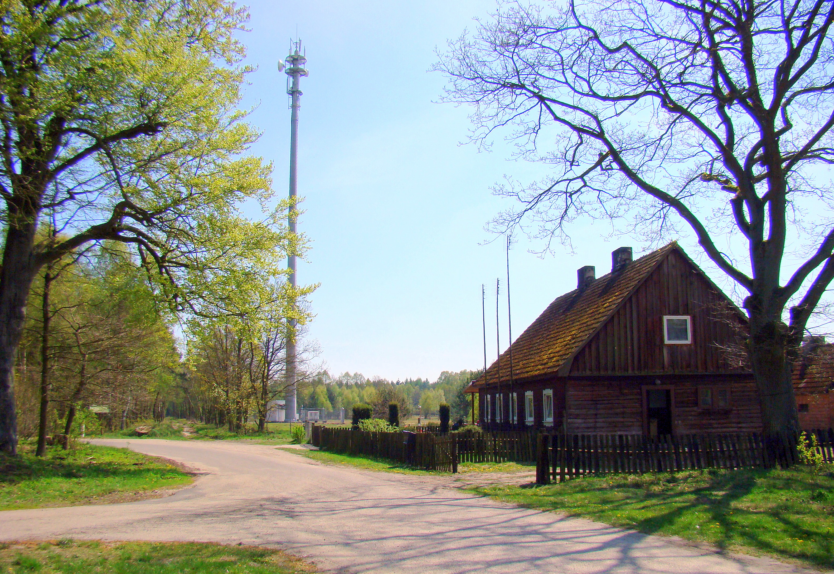 Nowa Jasienica, (Gmina Police, Powiat policki, Województwo zachodniopomorskie), Polska